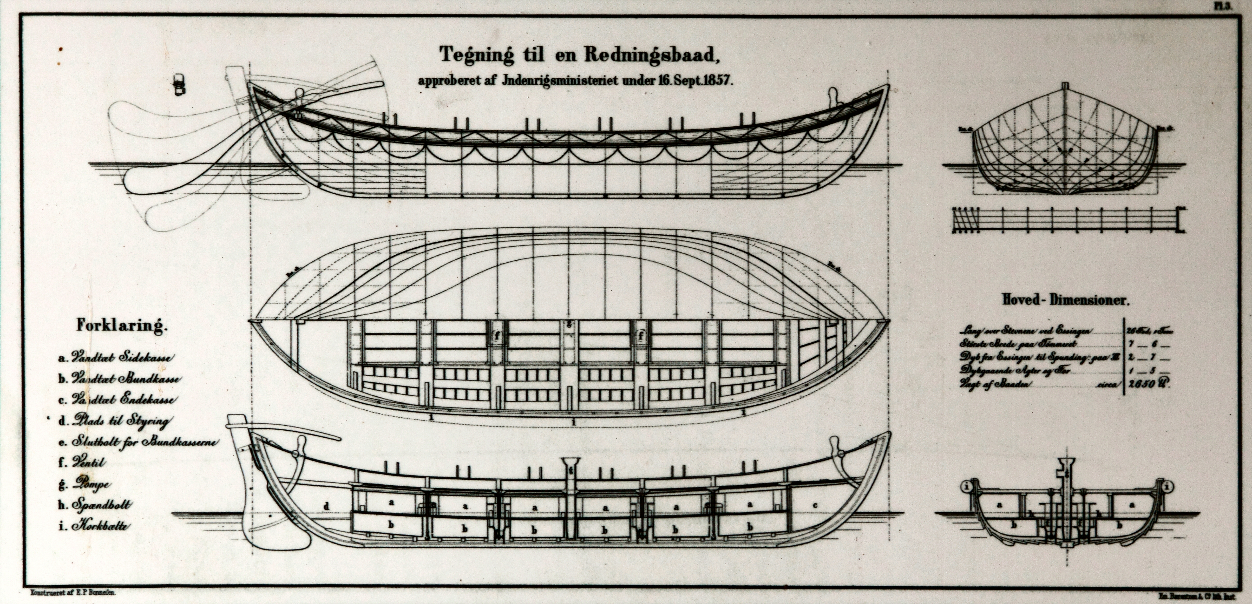 tegning af redningsbåd fra 1857